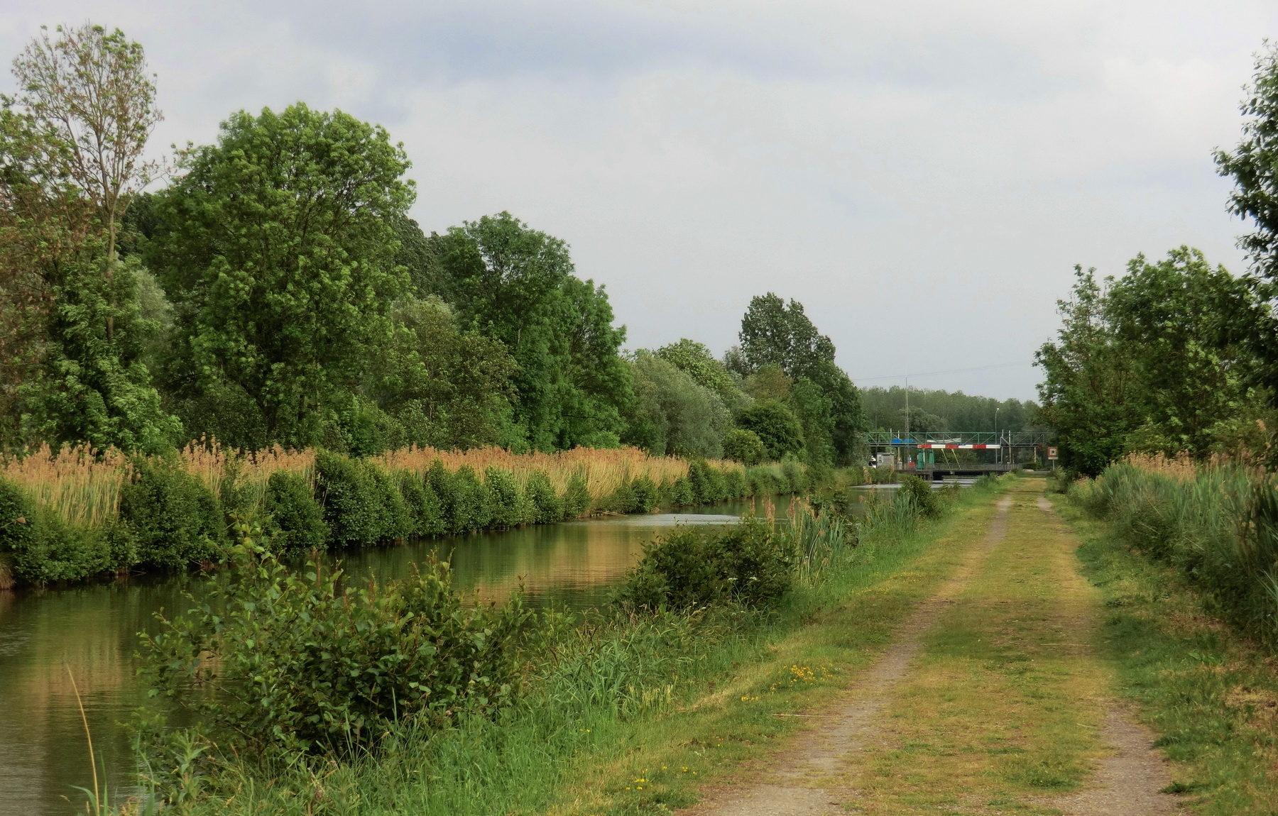 Catillon-sur-Sambre, France